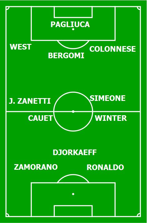 formazione titolare dell'inter 1997-1998